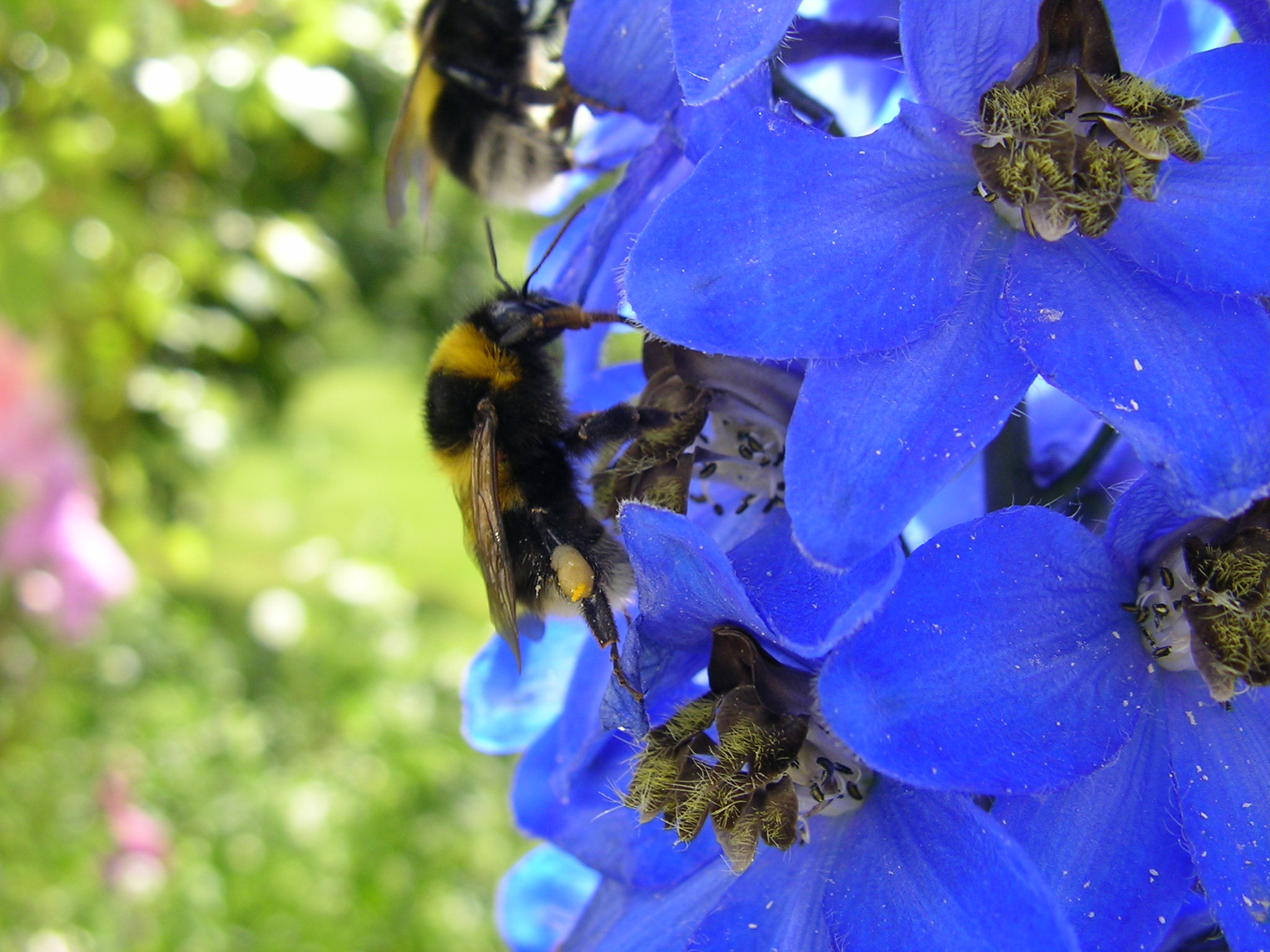 Hummel auf der Pflanze Hoher Rittersporn